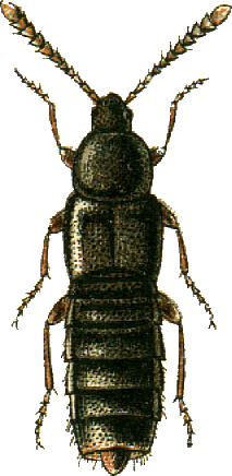 This file has been extracted from another file: Jacobs13.jpg